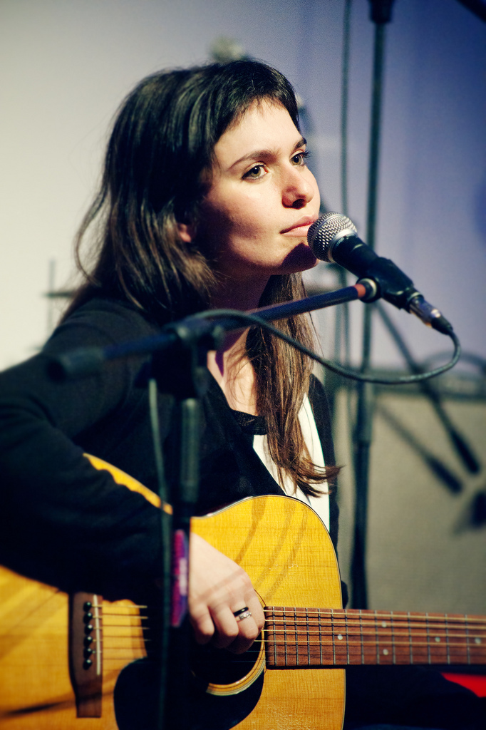 La cantautrice pugliese Erica Mou ad un concerto.